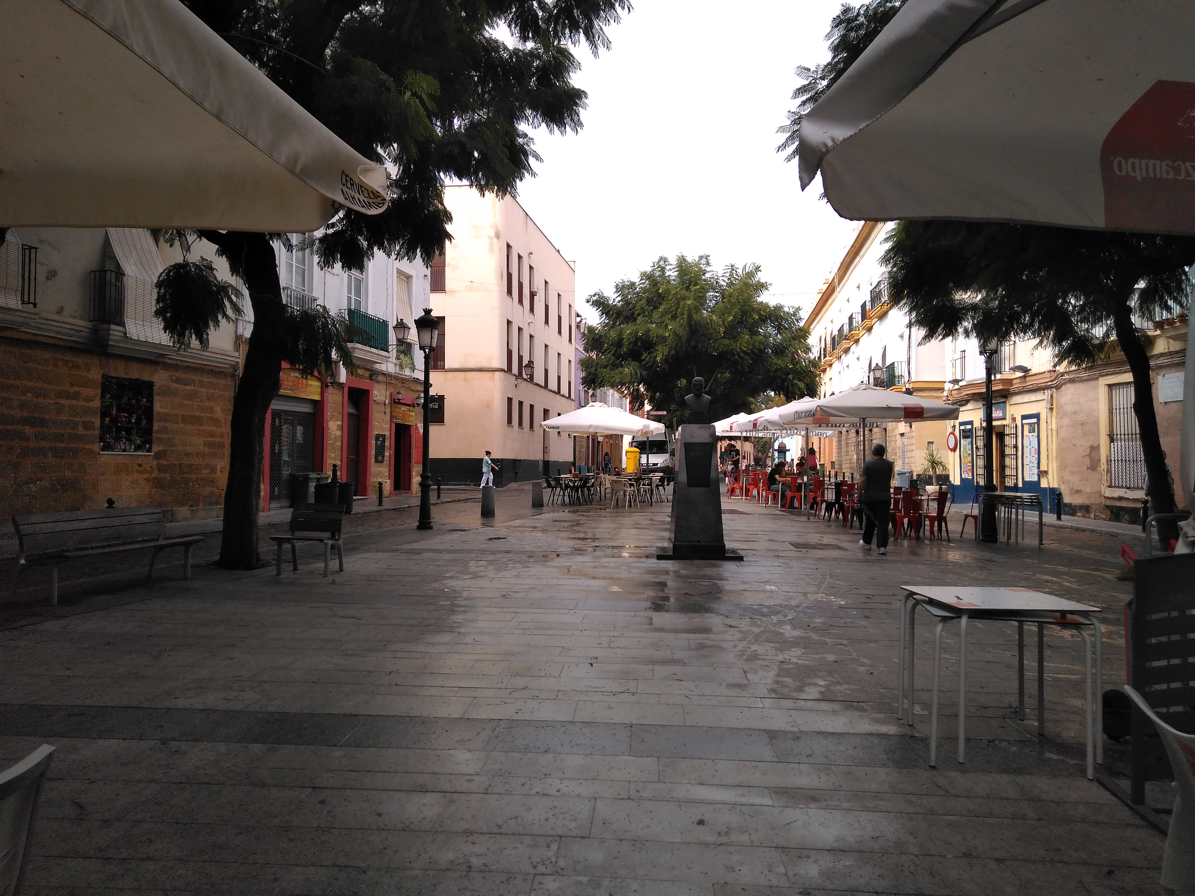 plaza de El Mentidero. Cádiz, España